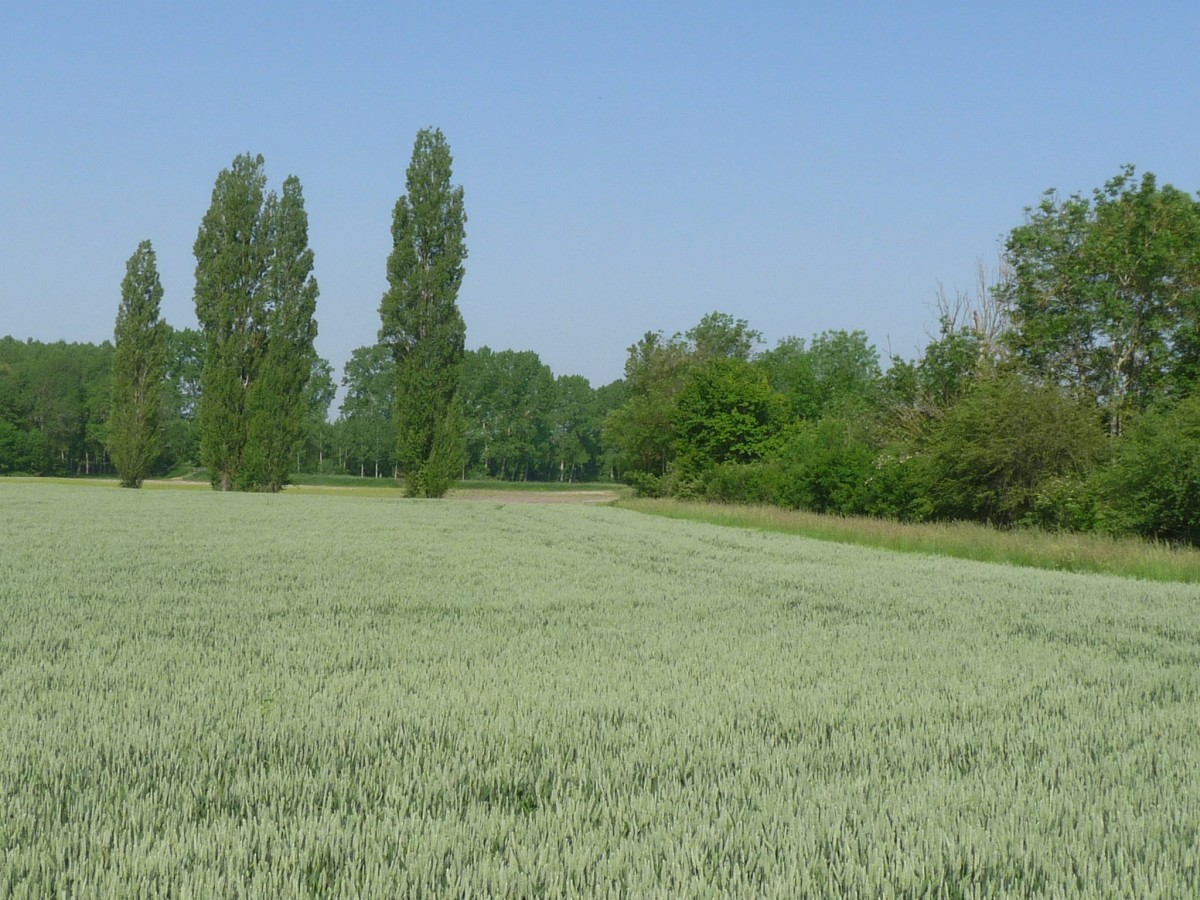 L'Ecly, pont sur la D.129, Péreuil, Charente, France; vue vers l'amont